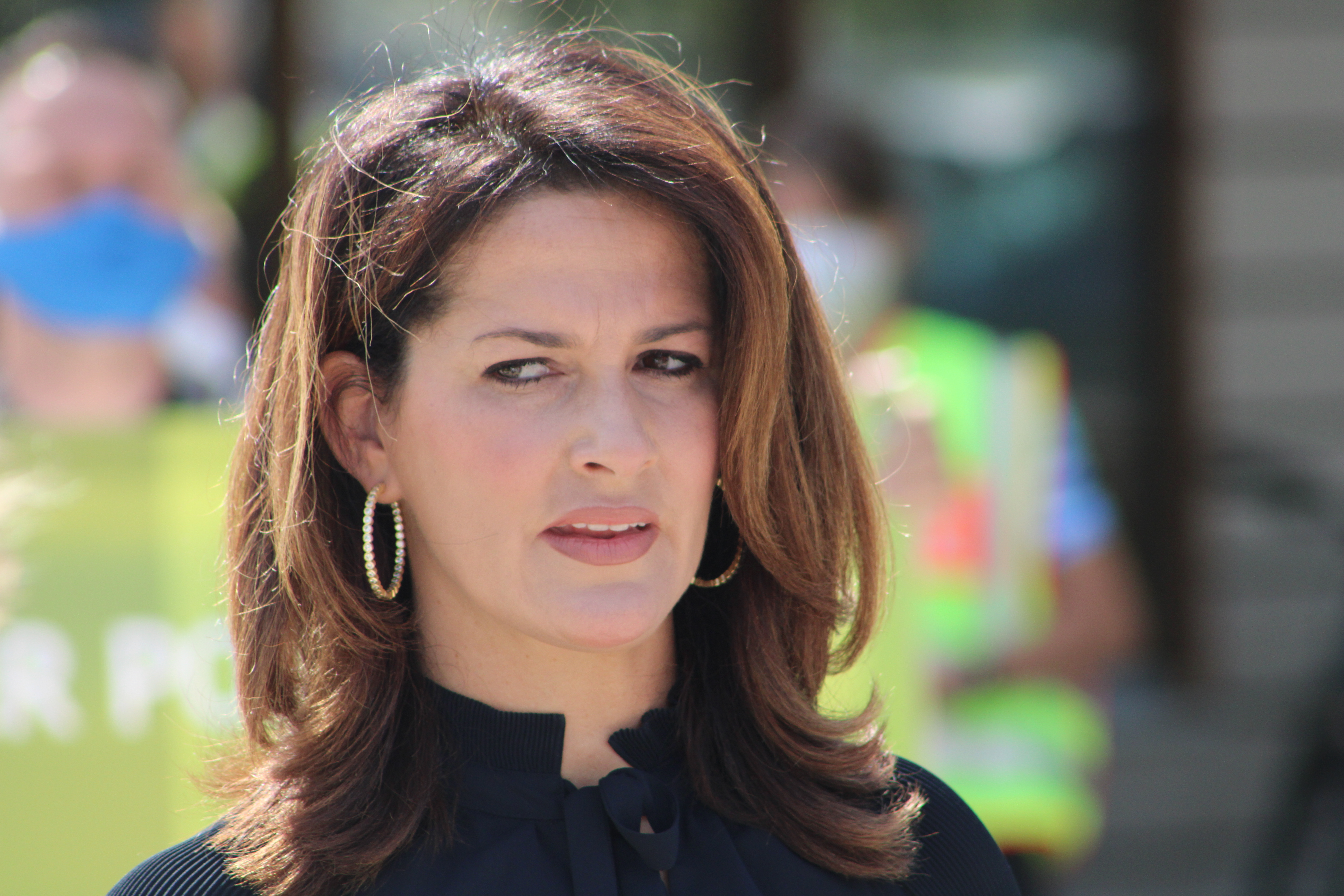 Michaela Kaniber, CSU in Prien am Chiemsee im Gespräch mit Demonstranten